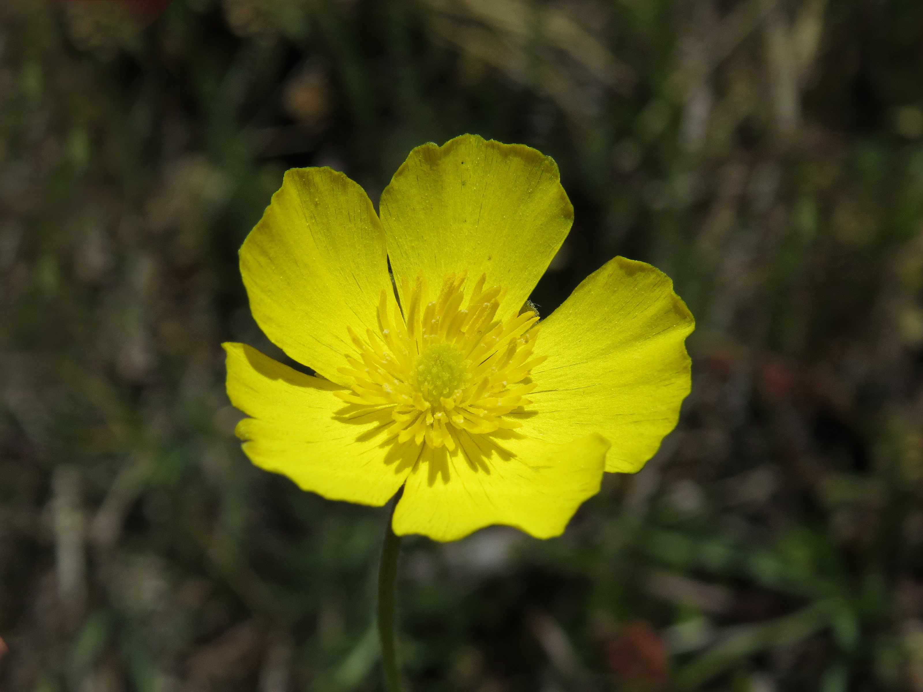 Flor de Ranunculus gramineus (Ranunculaceae). Bosque de la Herrería, El Escorial (Madrid).